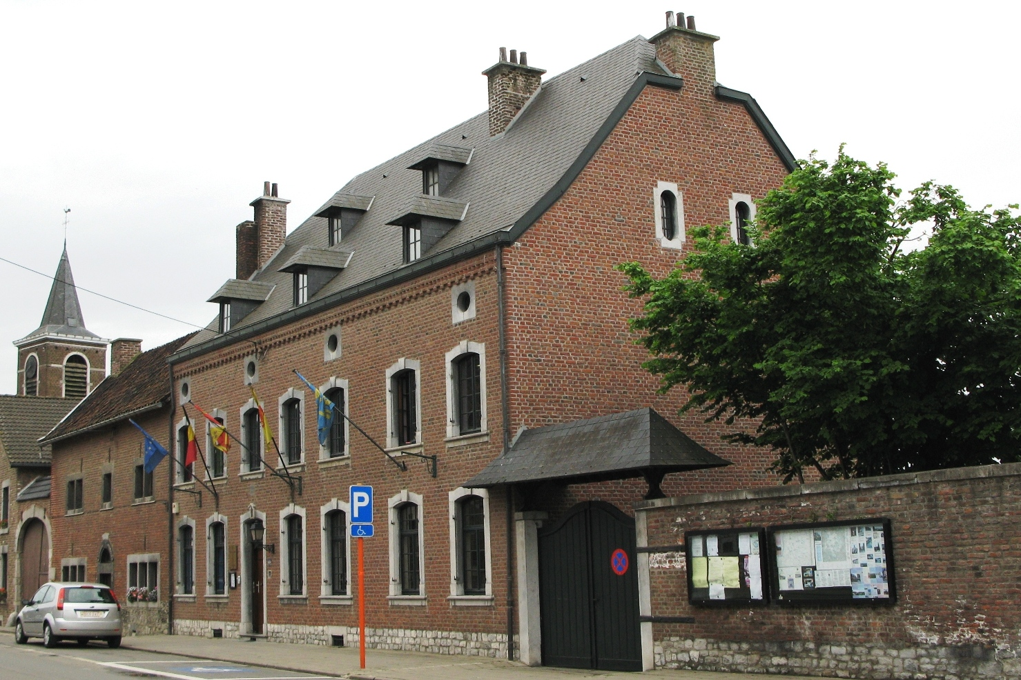 Maison communale de Dalhem à Berneau en mai 2008